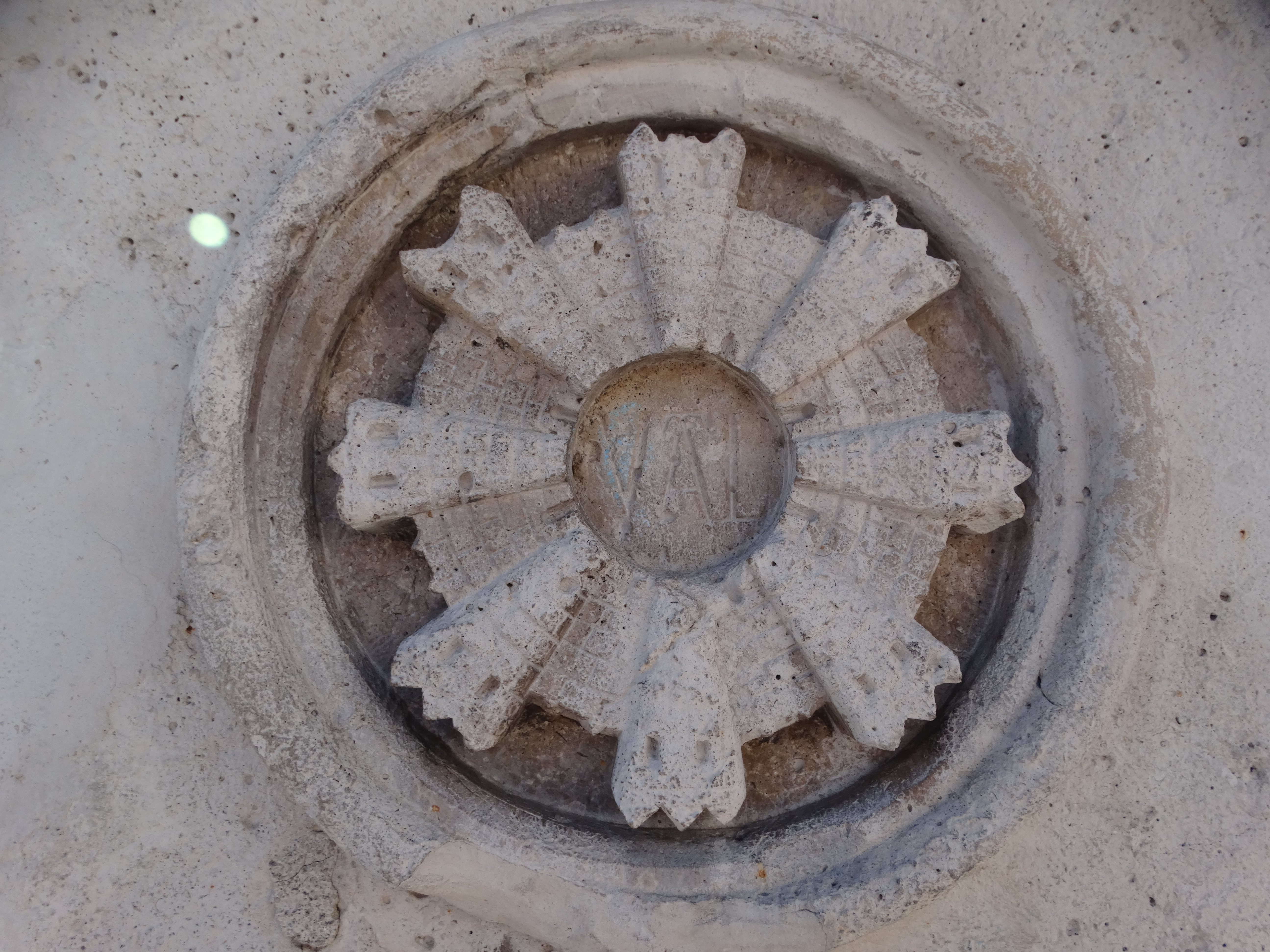 Primer sello que tuvo Valladolid, España, en el siglo XIII representando la antigua muralla con sus puertas torreadas y parte del alcázar viejo. La fotografía está tomada de los laterales del pedestal de la estatua del conde Pedro Ansúrez en la plaza Mayor de esta ciudad. Labrado en piedra.